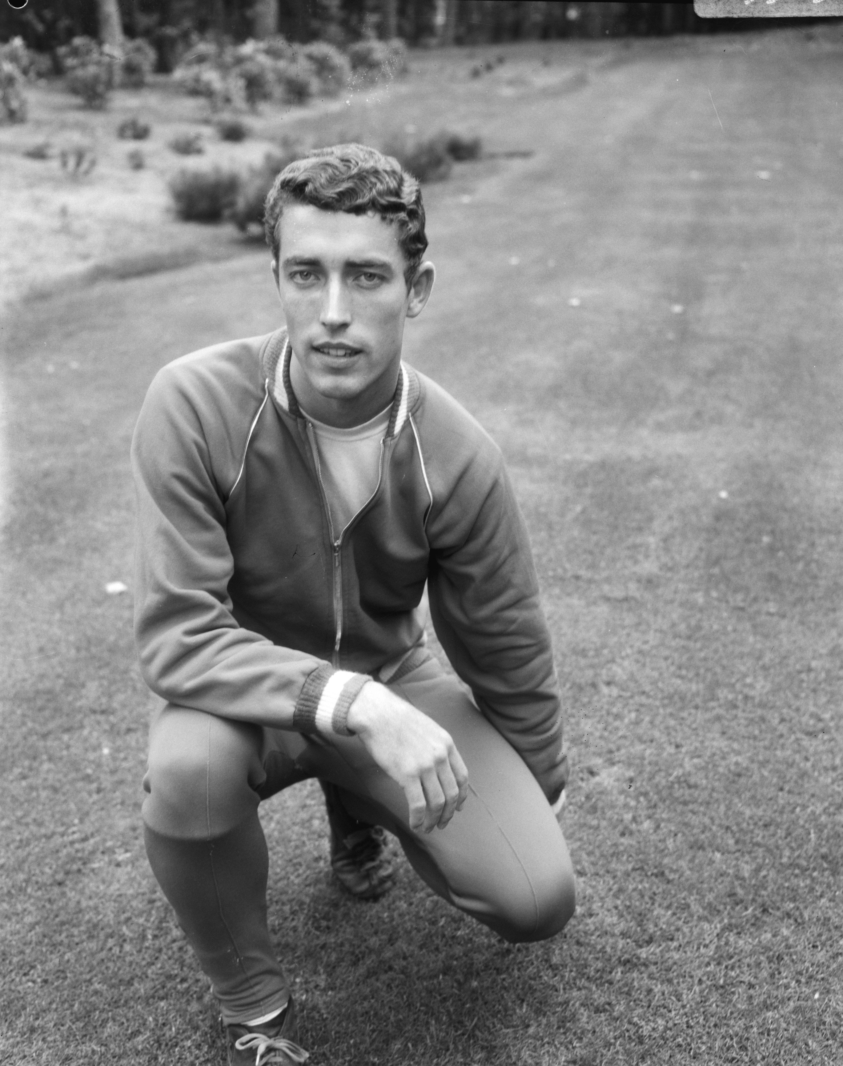 Collectie / Archief : Fotocollectie Anefo Reportage / Serie : Training van het Nederlands voetbalelftal op het KNVB-sportcentrum te Zeist Beschrijving : Henk Warnas, speler van Go Ahead Datum : 31 augustus 1966 Locatie : Utrecht (prov), Zeist Trefwoorden : portretten, sport, sporttrainingen, voetbal Persoonsnaam : Warnas, Henk Fotograaf : Bilsen, Joop van / Anefo Auteursrechthebbende : Nationaal Archief Materiaalsoort : Negatief (zwart/wit) Nummer archiefinventaris : bekijk toegang 2.24.01.04 Bestanddeelnummer : 919-5151